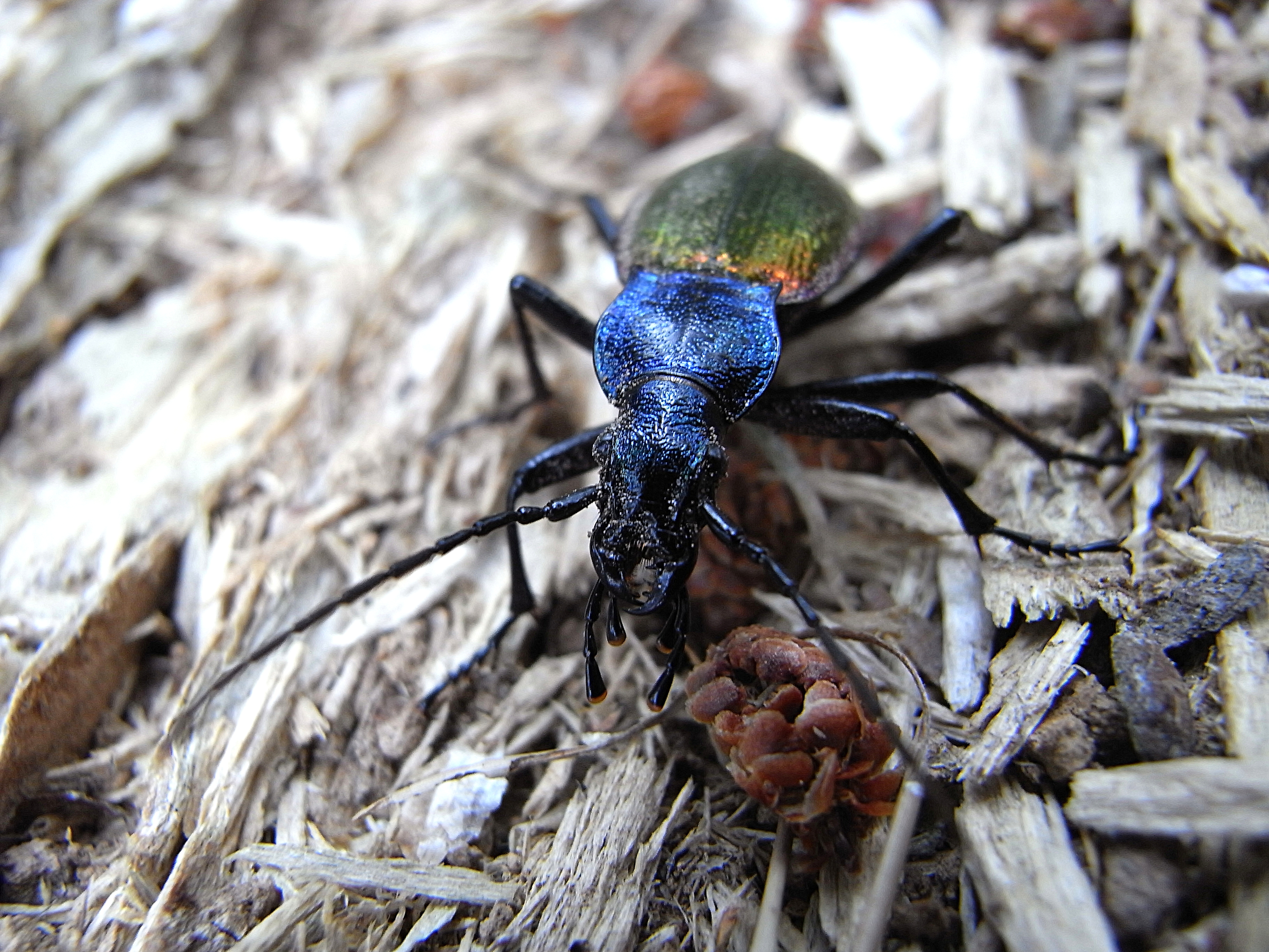 Carabus hispanus Ricoh R8